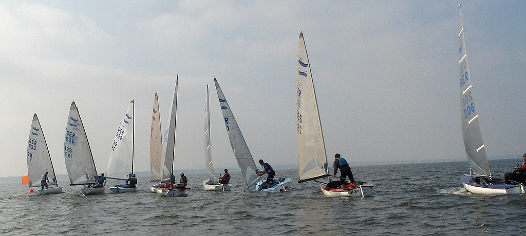 Int. Kehraus-Regatta 2008 - Steinhuder Meer - Start d. vorletzten Wettfahrt - Links im Bild Masters Weltmeister Andre' Budzien. Finn-Dinghi-Regatta.